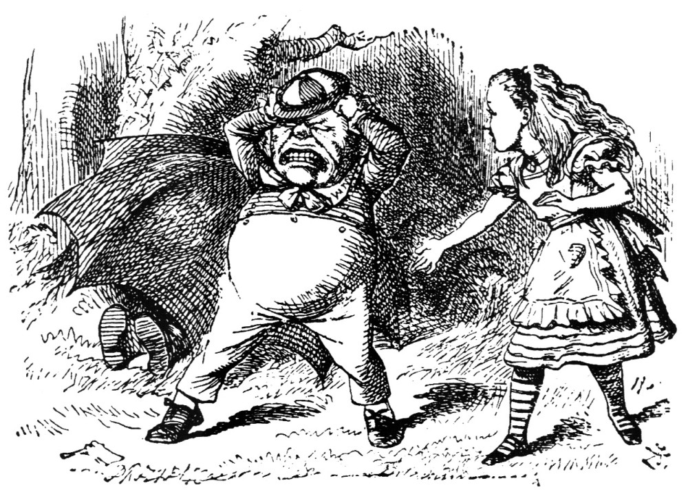 гравюра Джона Тенниела